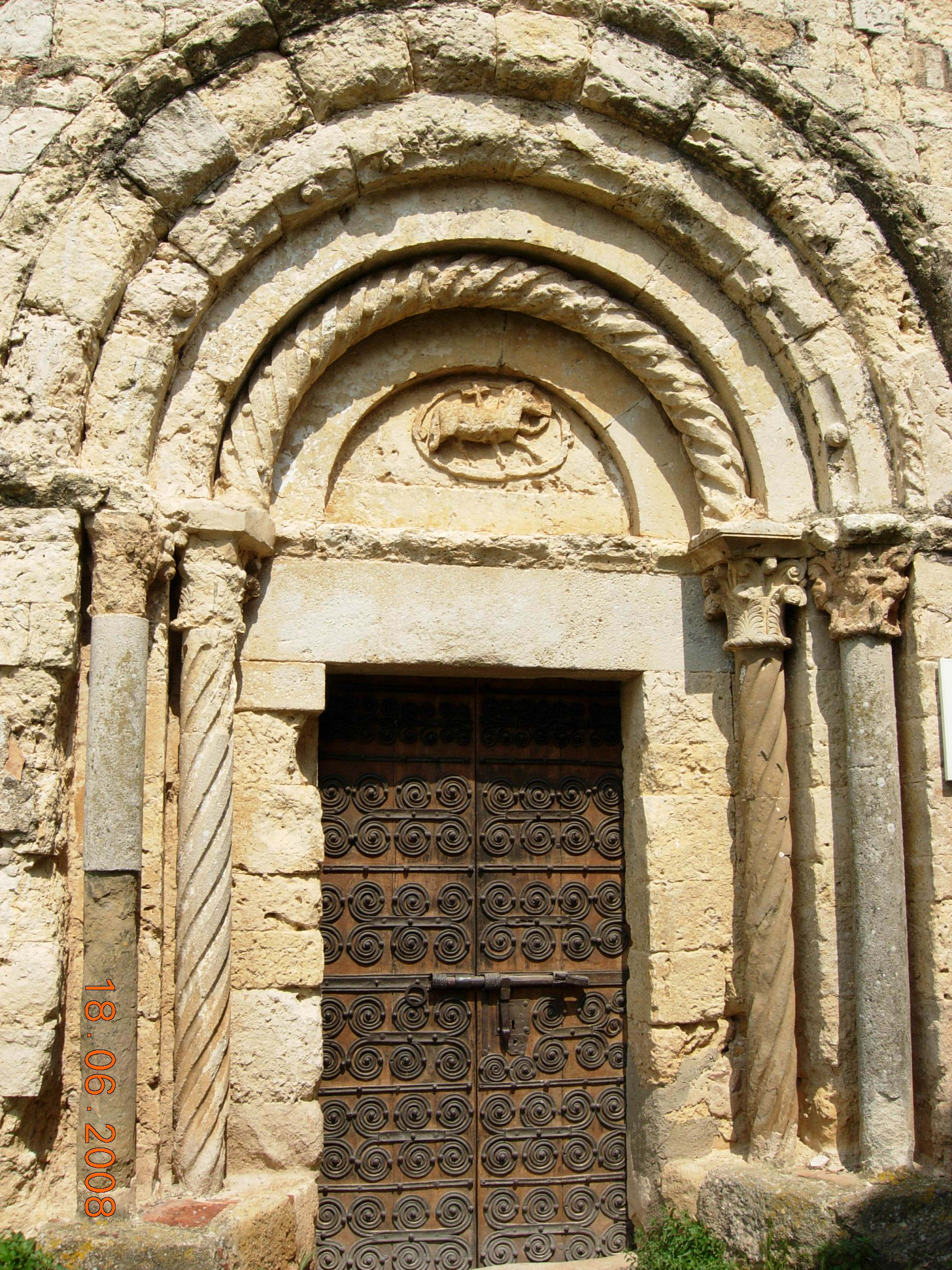 portada de l'esgèsia vella de can Miró